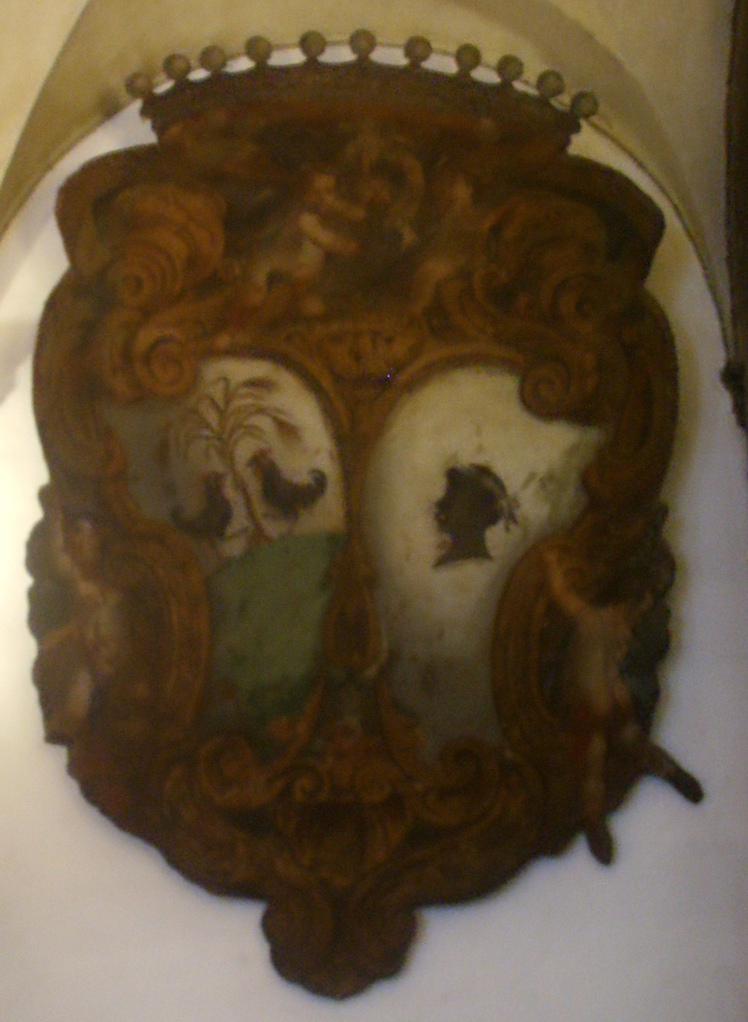 Palazzo Pucci in Florence, Italy